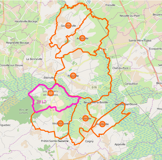 Carte de la commune nouvelle avec ses communes déléguées